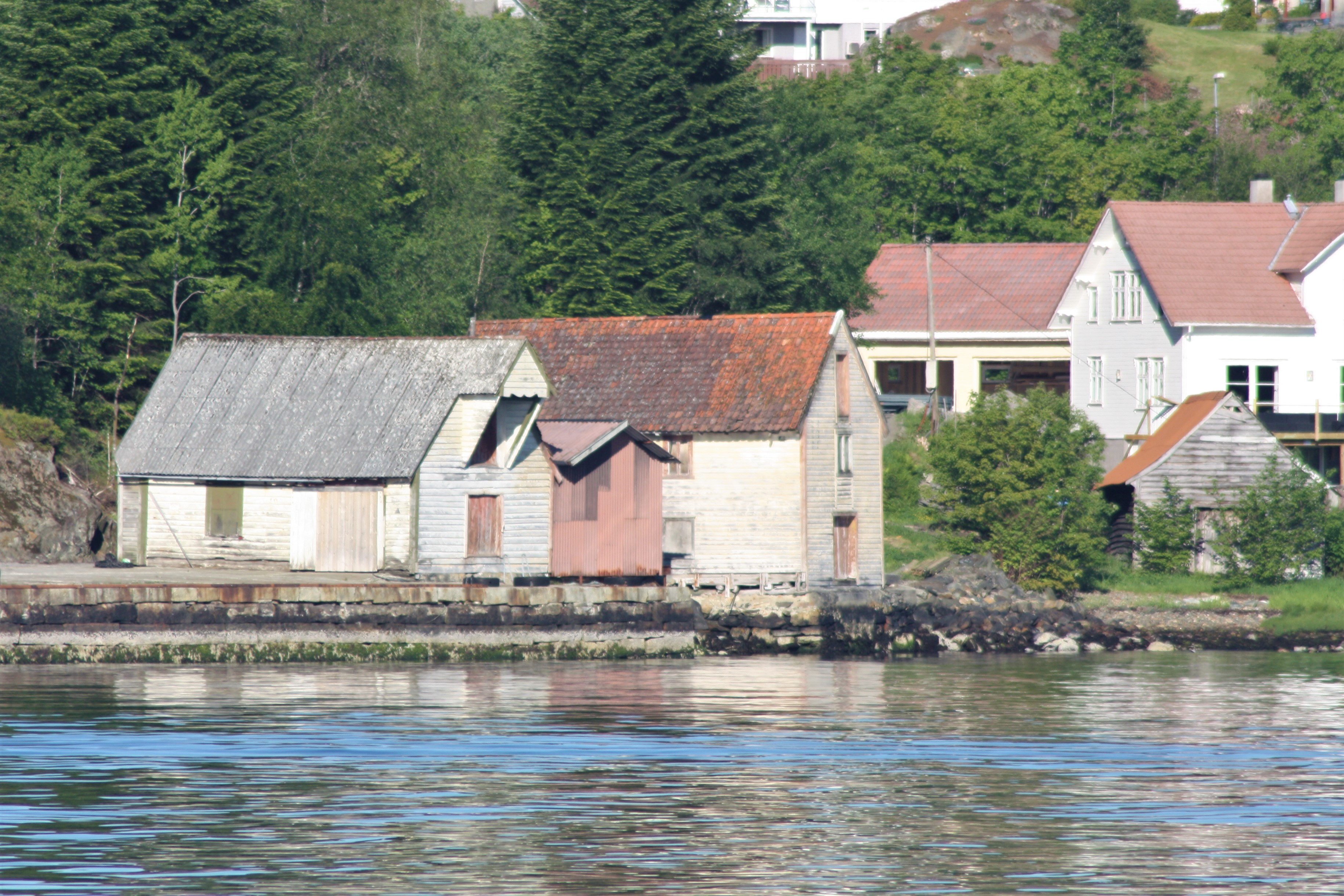 Kirkebryggen på Klokkarvik sett fra sjøen